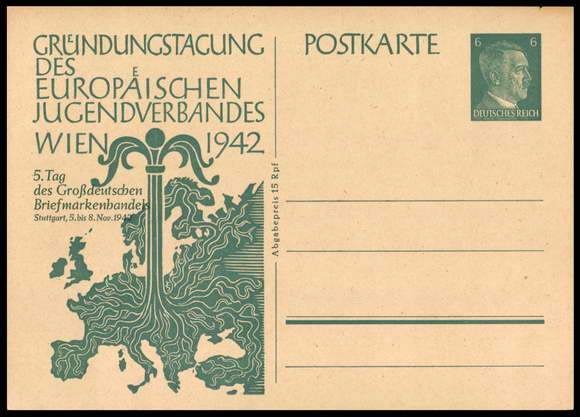 Sonderpostkarte zur Gründung des Europäischen Jugendverbandes in Wien 1942. Bild links: Symbolische Darstellung eines aus Europa aufgewachsenen Baumes